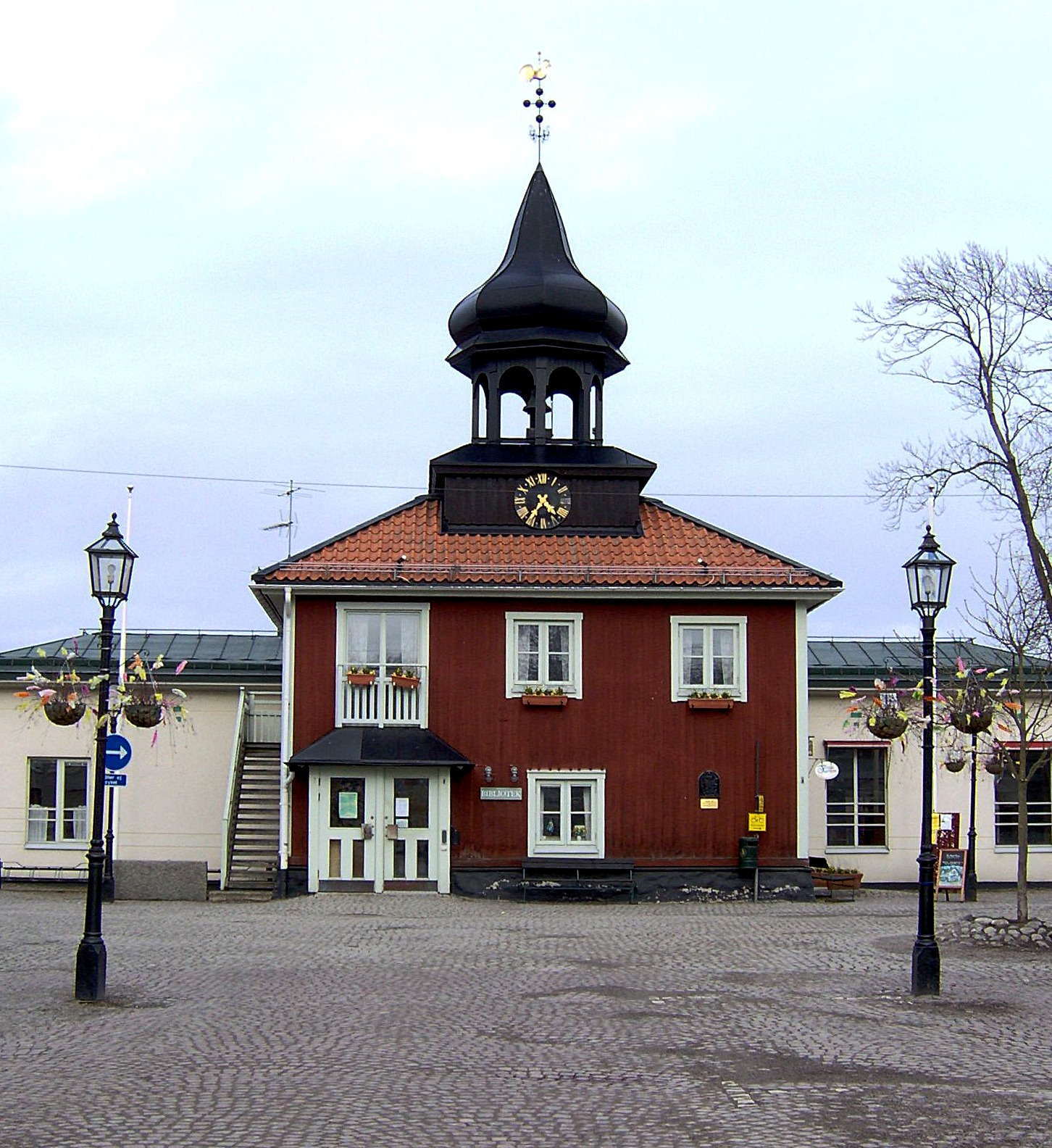 Trosa Bibliotek och Turistbyrå.